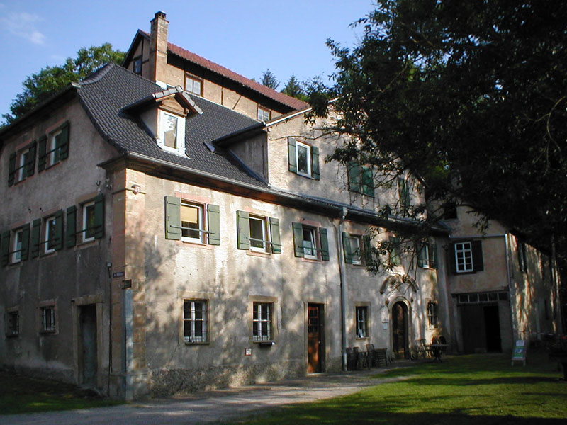 Maysack'sche Mühle von 1829 in Neckarmühlbach. Vorläuferbauten dieser Mühle sind am Ort seit dem 14. Jhd. nachgewiesen, die Mühle gehörte bis 1808 zur Burg Guttenberg.